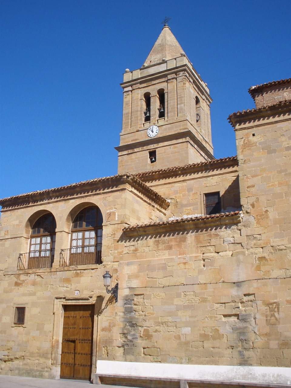 Church of San Martín, Alberite